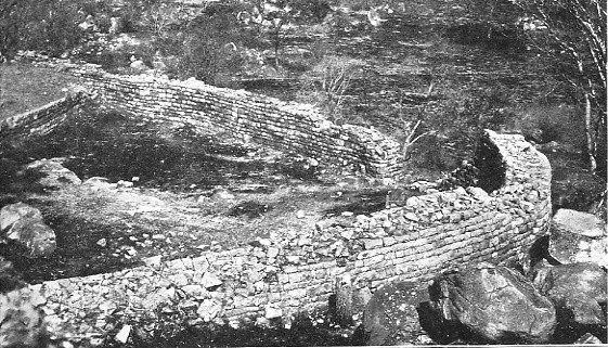 Ruins of Khami, Zimbabwe, near Bulawayo (Torwa Dynasty)